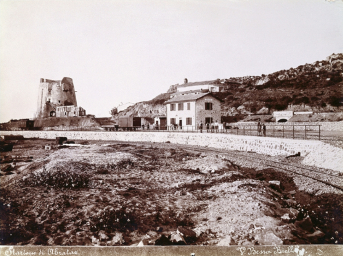 Foto dell'inizio del secolo.